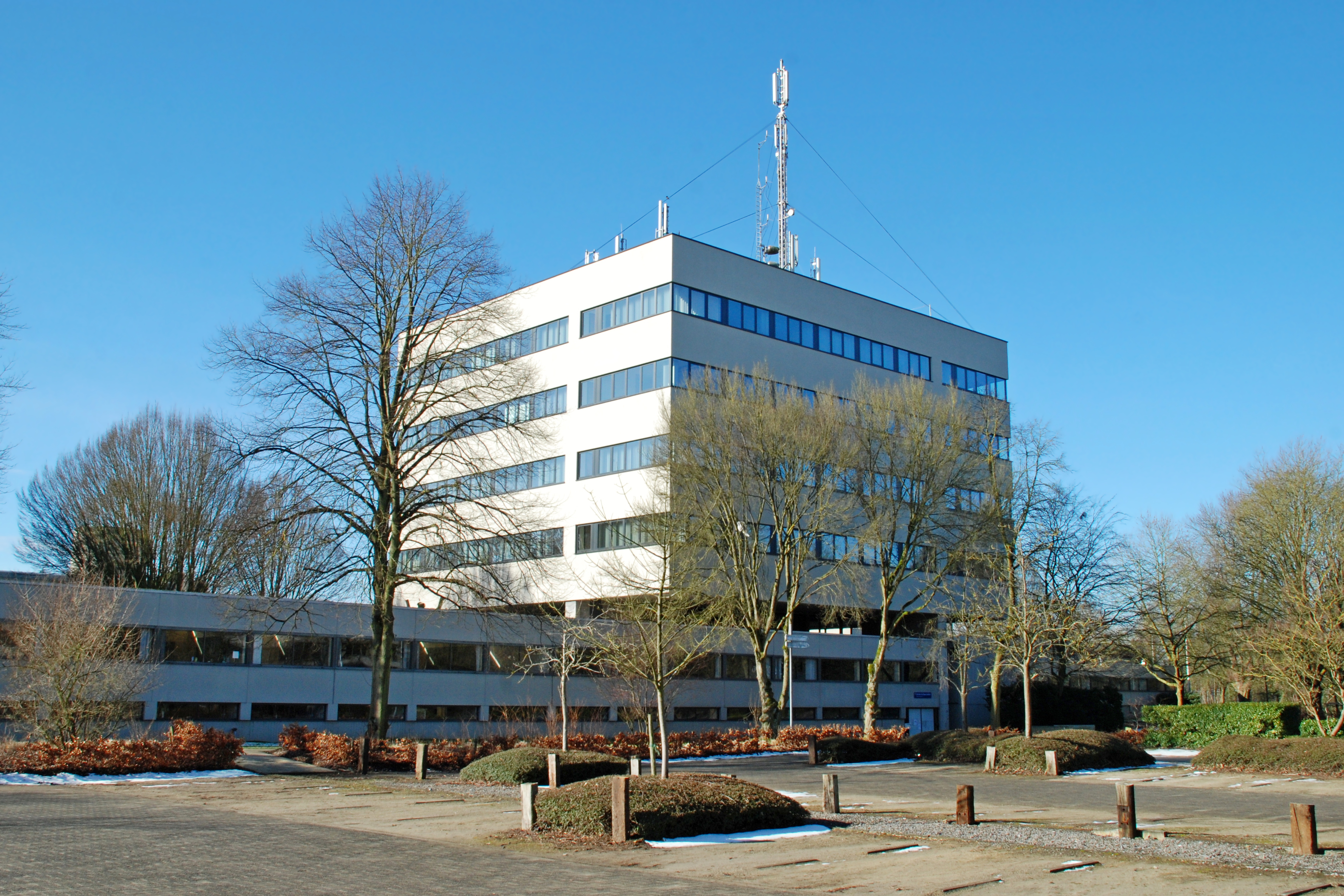 Belgique - Brabant wallon - Louvain-la-Neuve - Cyclotron (chemin du Cyclotron, architecture de style brutaliste, 1970-1972) : Tour nord This photo of immovable heritage has been taken in the Walloon Region